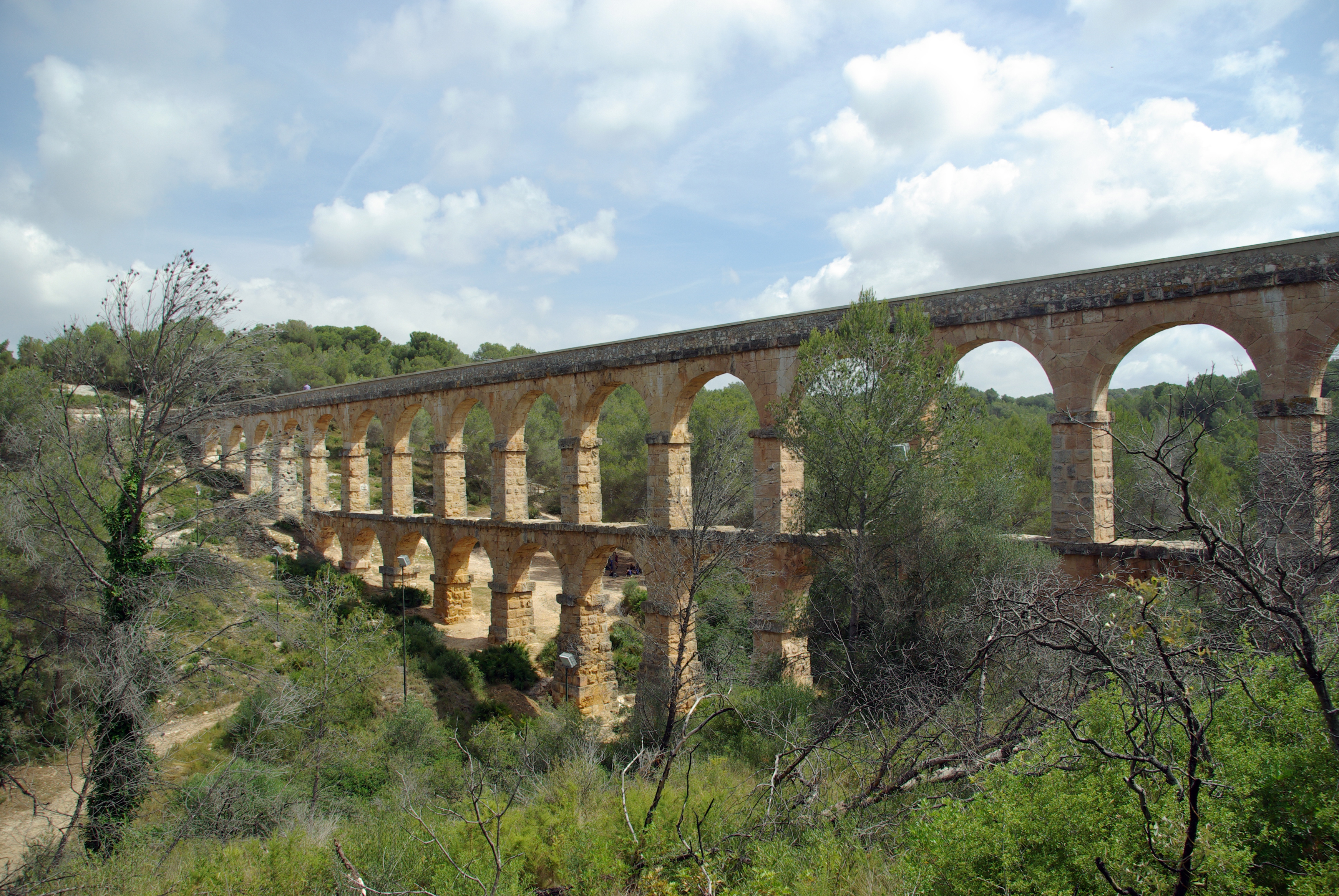 Aqüeducte de les Ferreres (Tarragona)